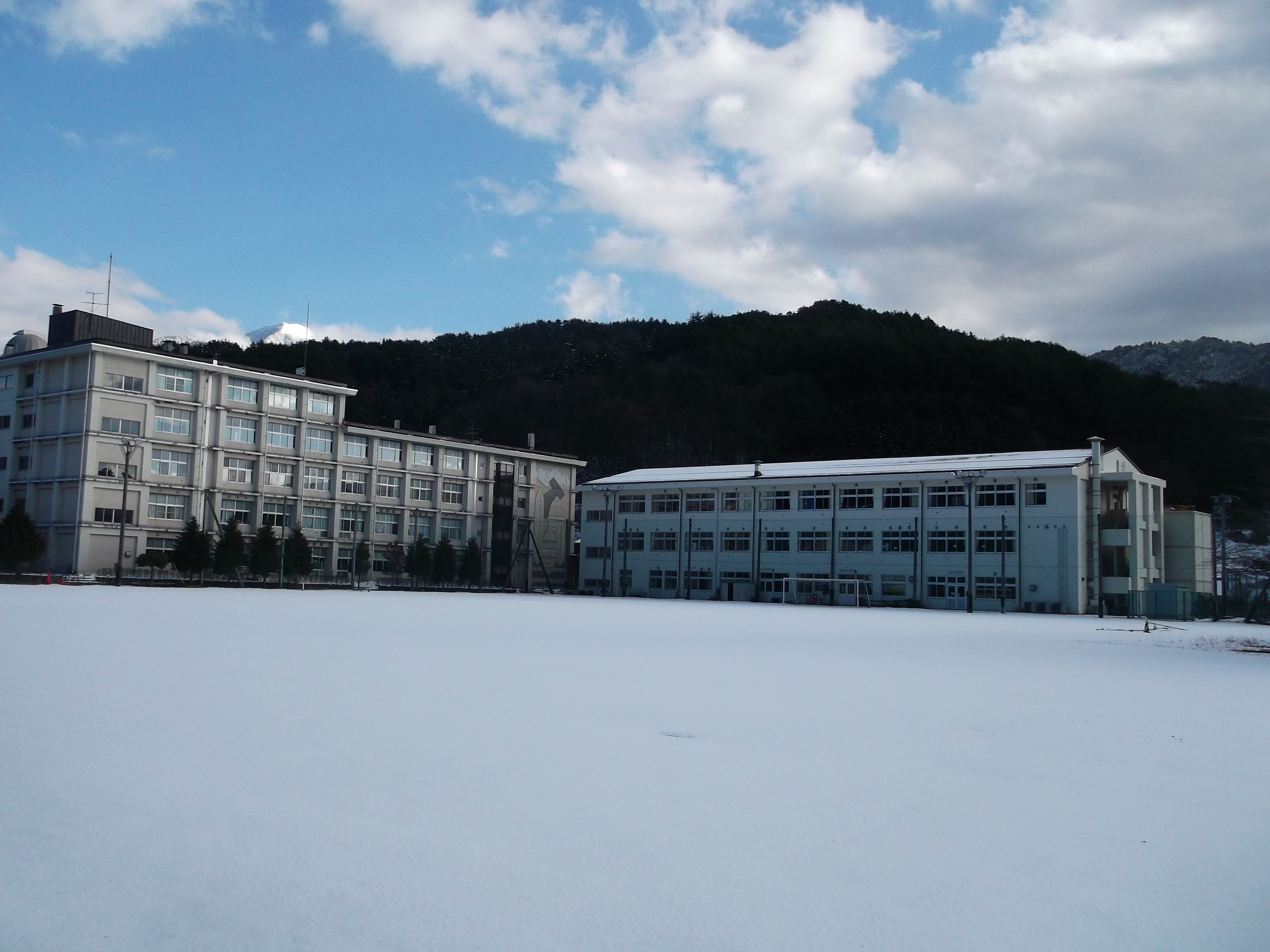 長野県立木曽青峰高等学校 丘の上キャンパス